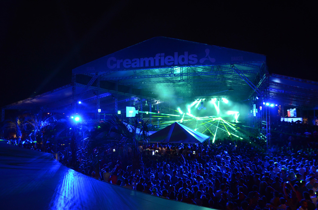 Creamfields, maior festival de dance music do mundo, nasceu há 14 anos no clube Cream, em Liverpool. Sua primeira edição foi em Winchester, em 1998. 3º edição do Creamfields Brasil. Music Park. Jurerê Internacional. Florianópolis. SC. Brasil.